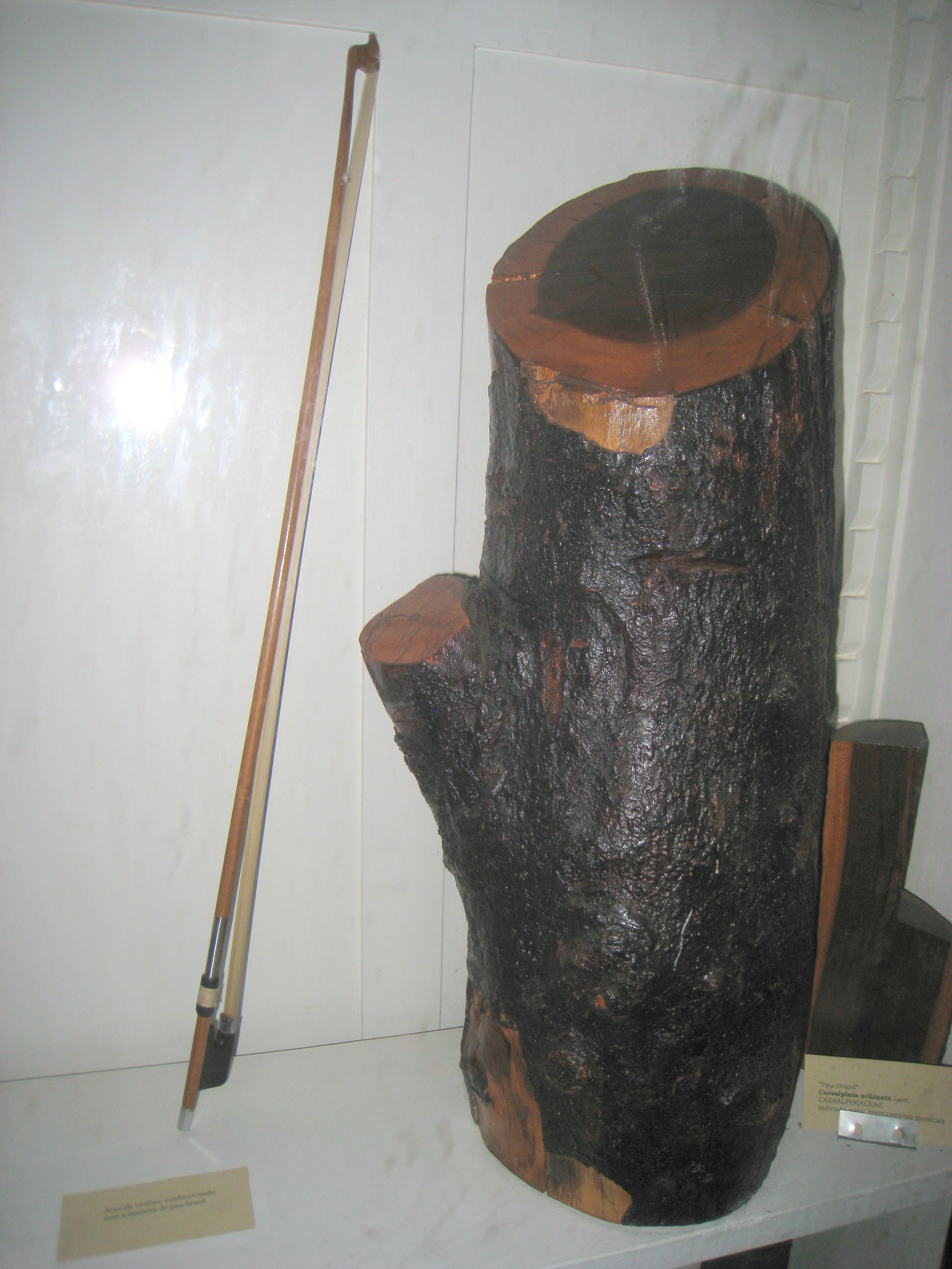 Caesalpinia echinata specimen in the Museu Botânico Dr. João Barbosa Rodrigues, Jardim Botânico de São Paulo, São Paulo City, SP, Brazil.